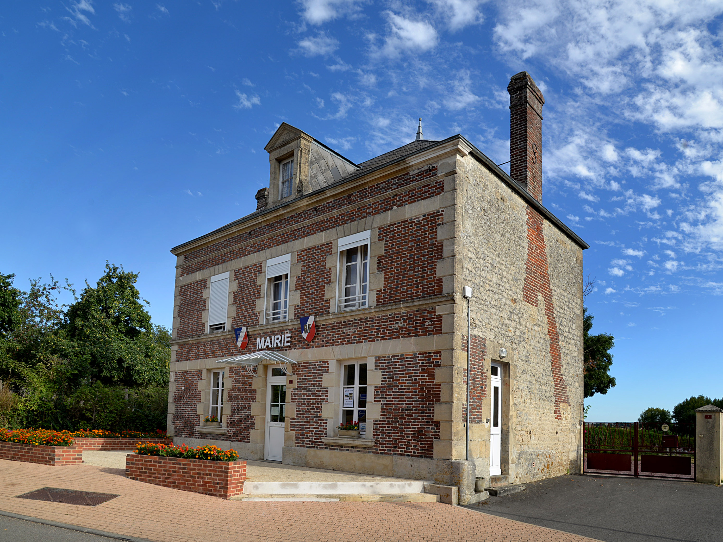 Goulet (Orne)